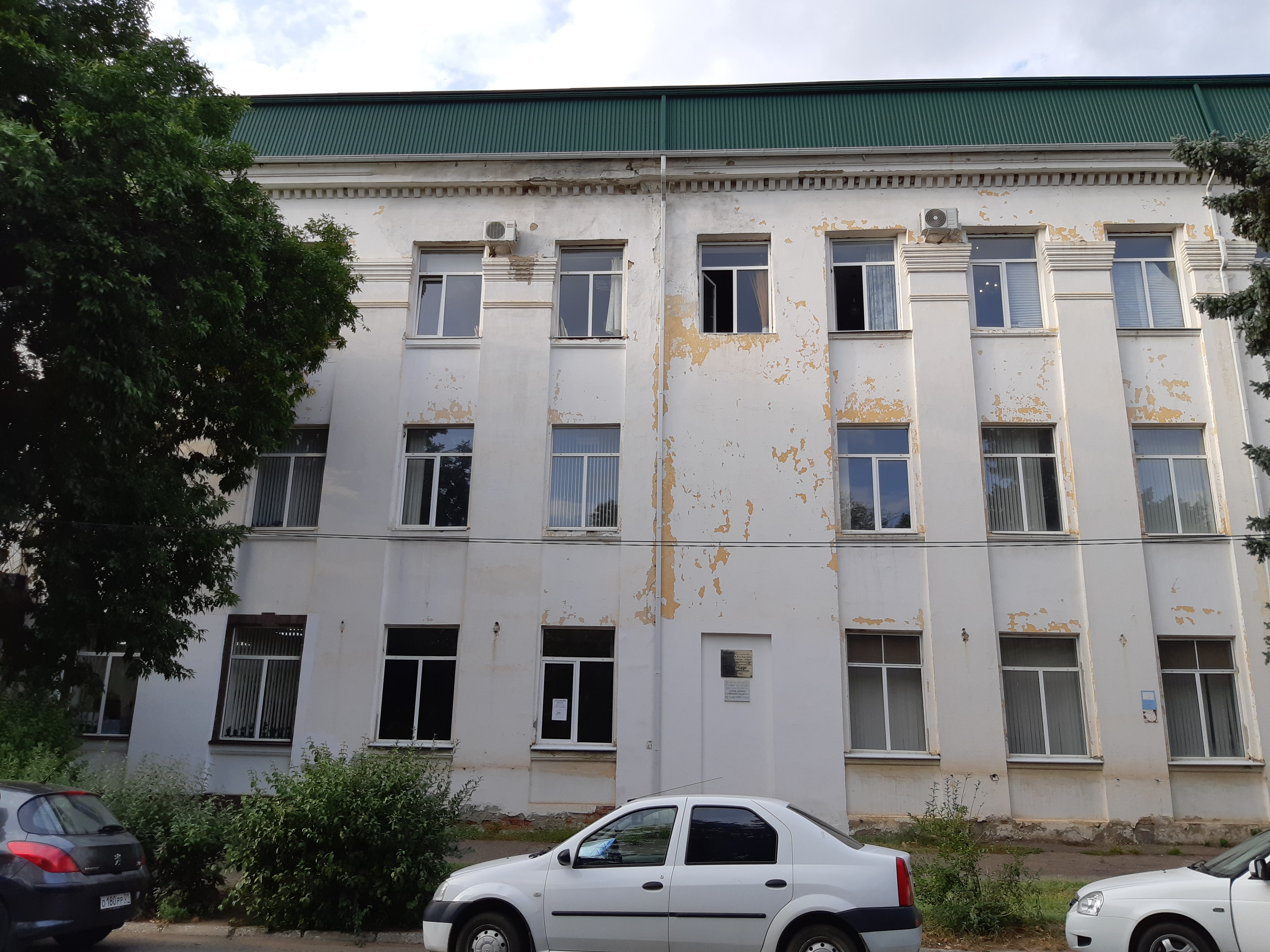 Здание, где располагался штаб 3-й отдельной кавалерийской бригады под командованием Я.Ф. Балахонова: улица Пионерская, 268, Майкоп, Адыгея